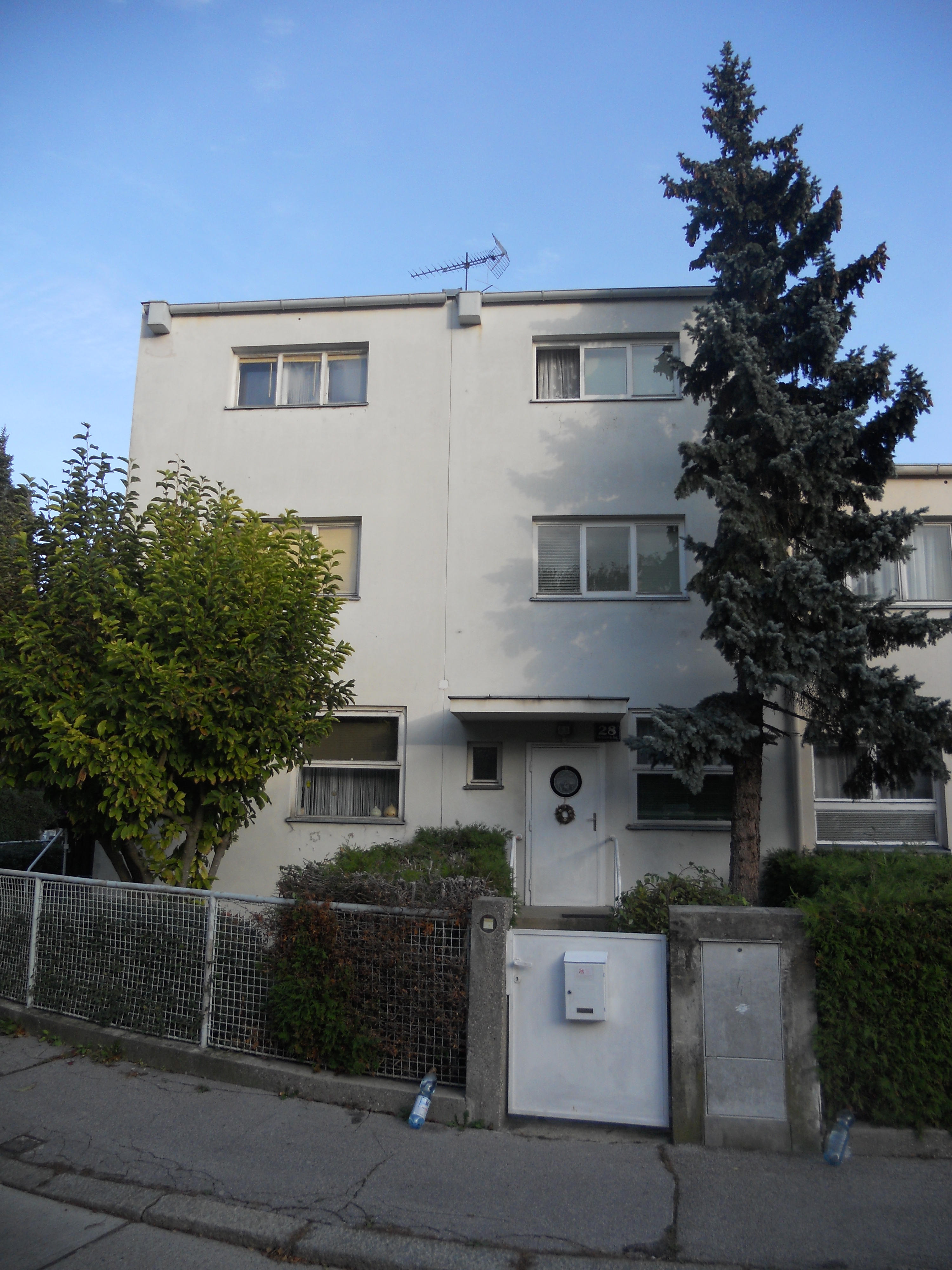 Wohnhaus mit Einfriedung - Werkbundsiedlung